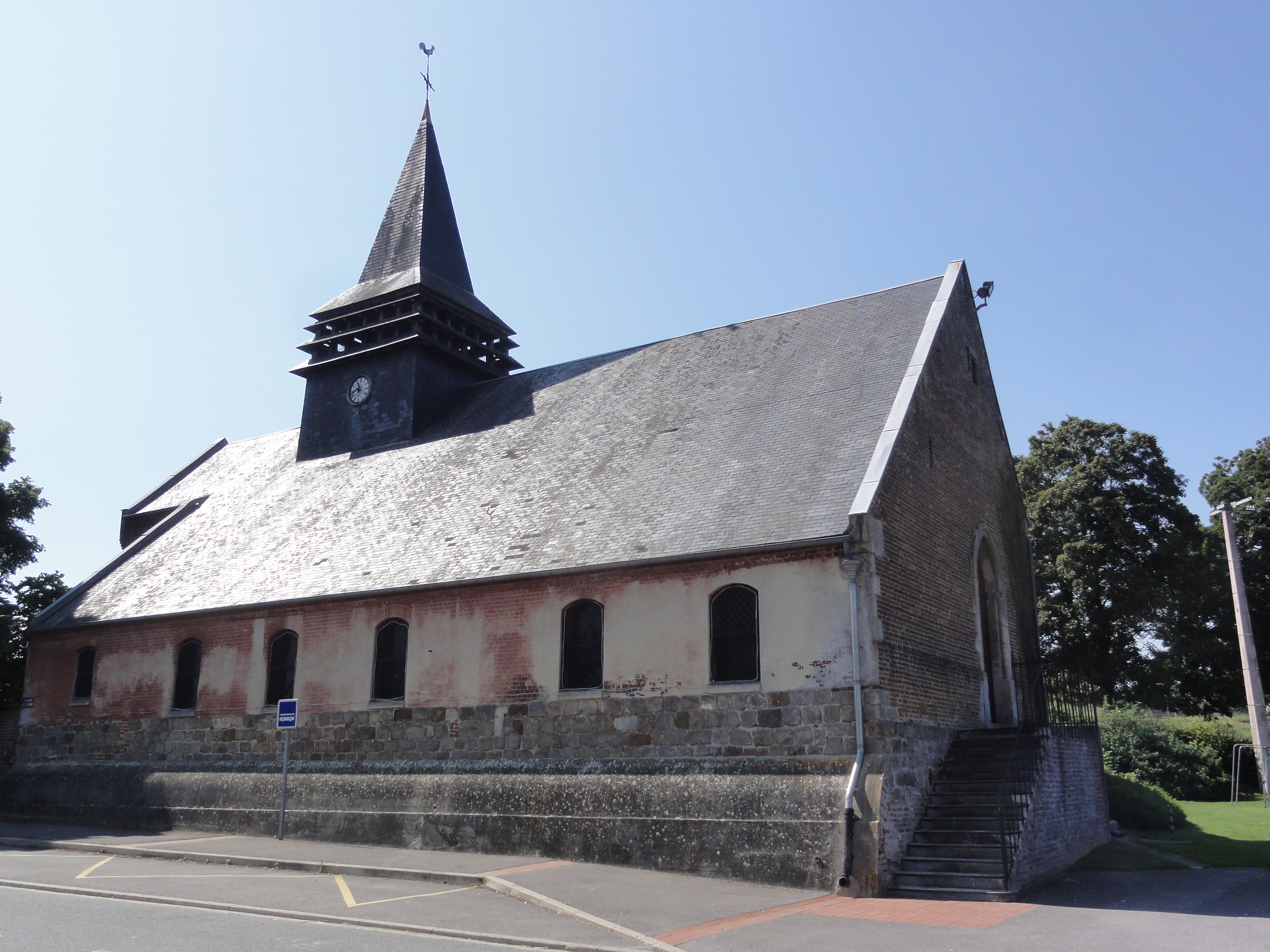 Ugny-le-Gay (Aisne) église Saint-Martin